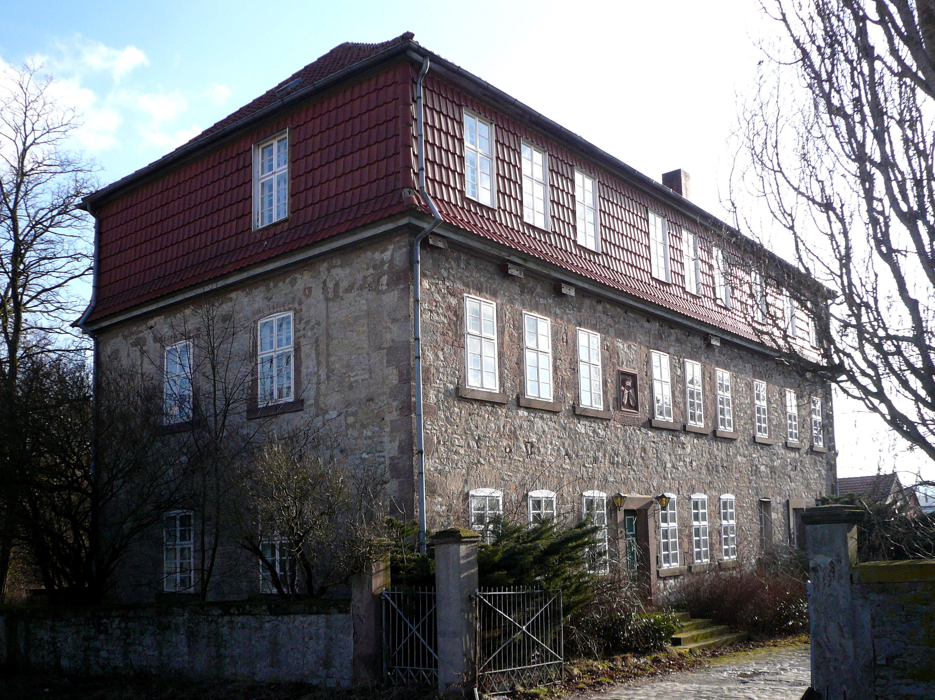 Herrenhaus des Gutshofes der Familie von Bodenhausen in Reckershausen, Gemeinde Friedland, Südniedersachsen. Erbaut 2. Hälfte 18. Jahrhundert, aufgestockt und umgestaltet Mitte 19. Jhdt.